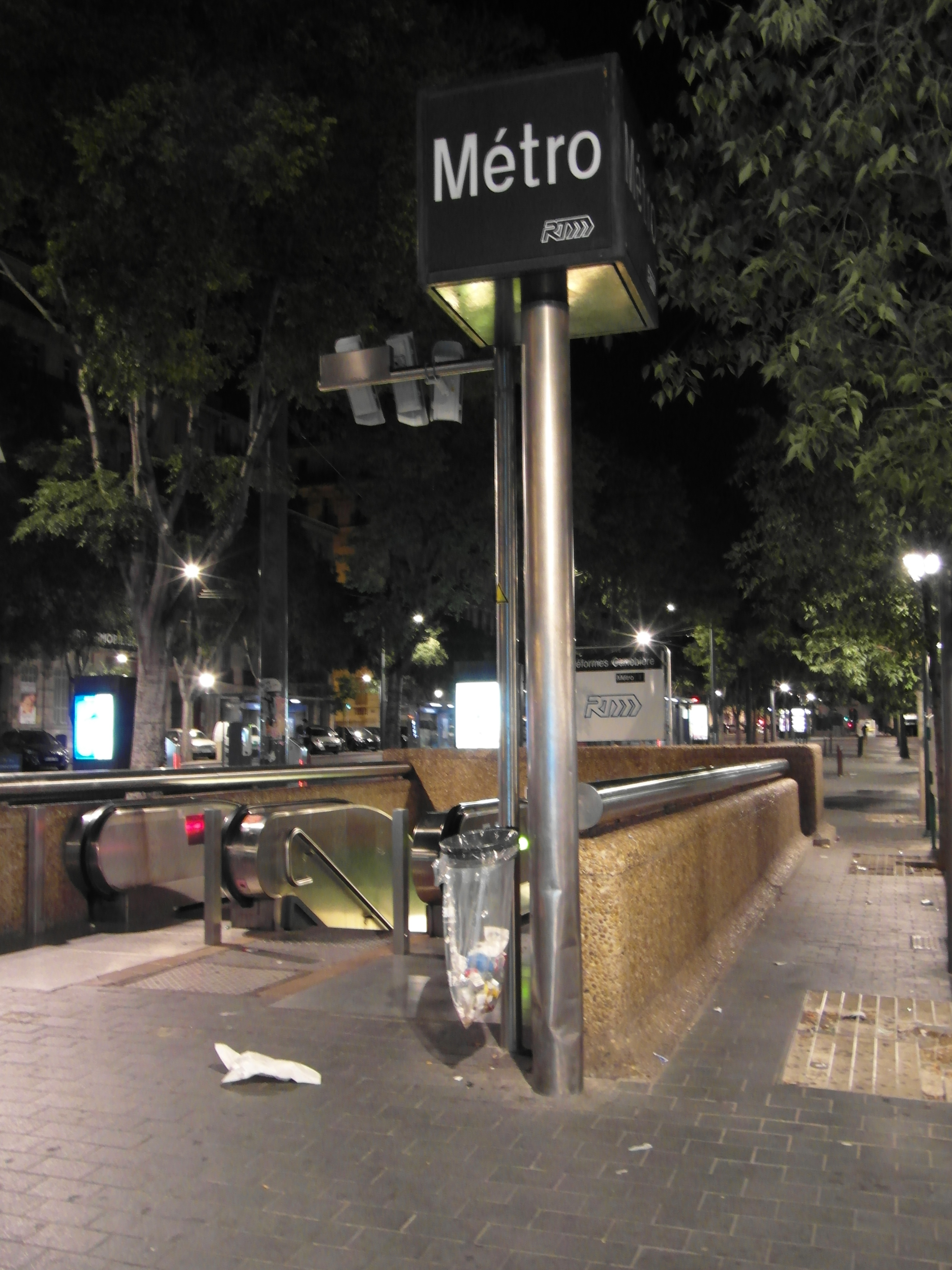 Marseille - Métro - Réformés-Canebière